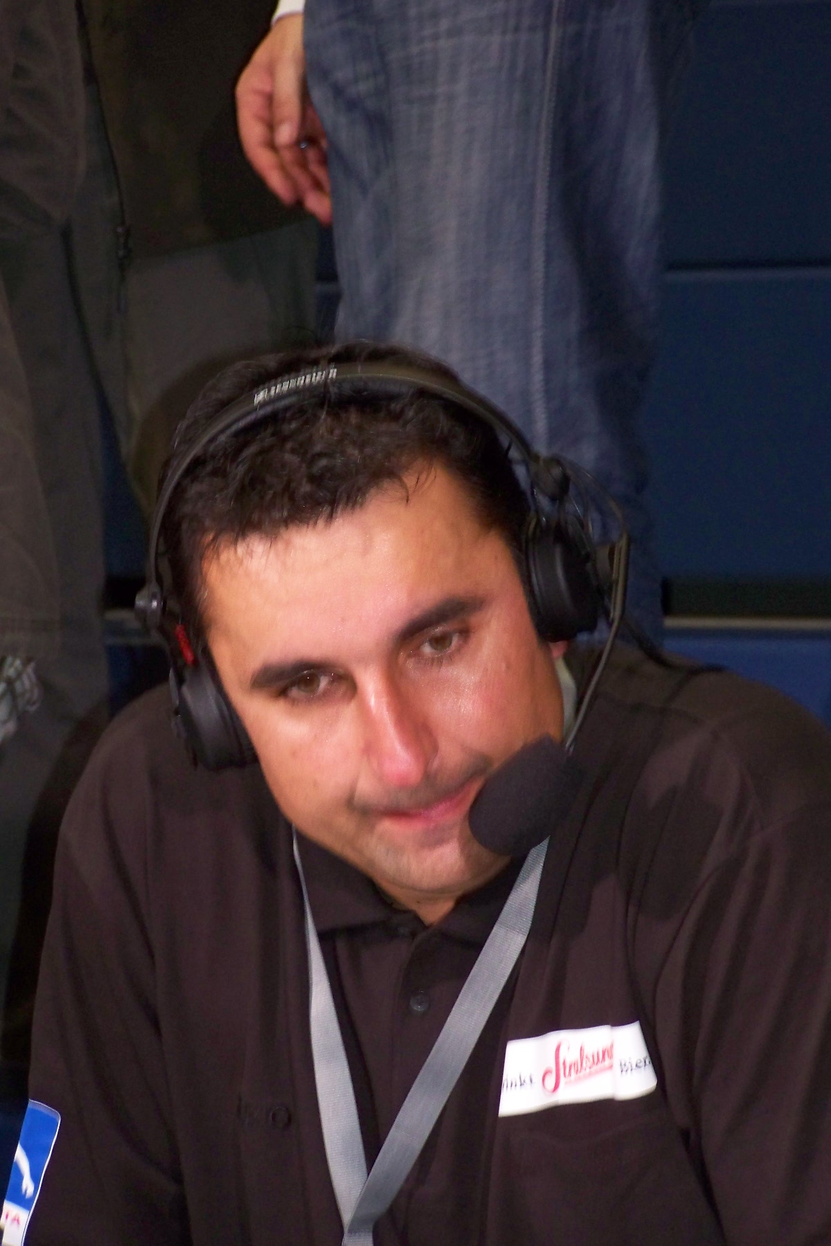 Zdeněk Vaněk, (* 19. Juli 1968), ehemaliger Handballspieler, Handballtrainer des Stralsunder Handballvereins, am 11. Oktober 2008 nach dem Spiel in der ersten Handball-Bundesliga gegen den VfL Gummersbach